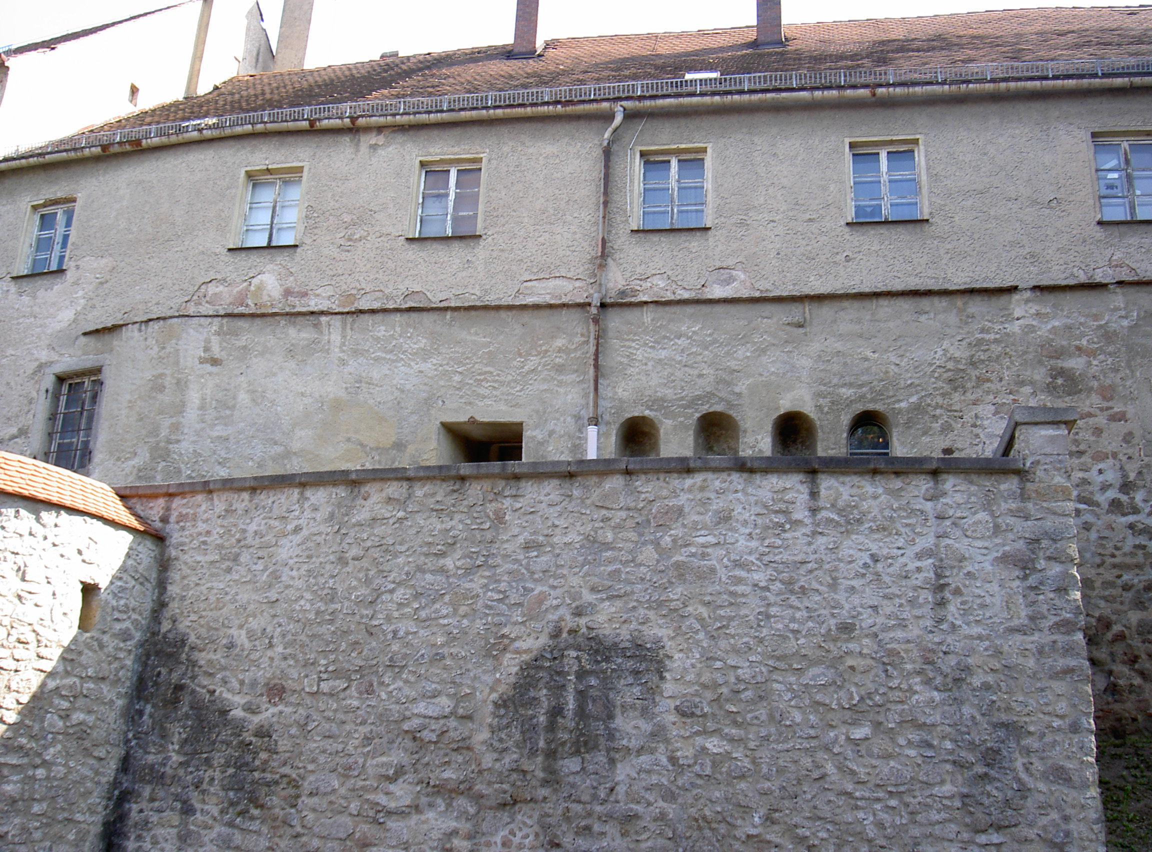 Neunburg vorm Wald, Im Berg 17